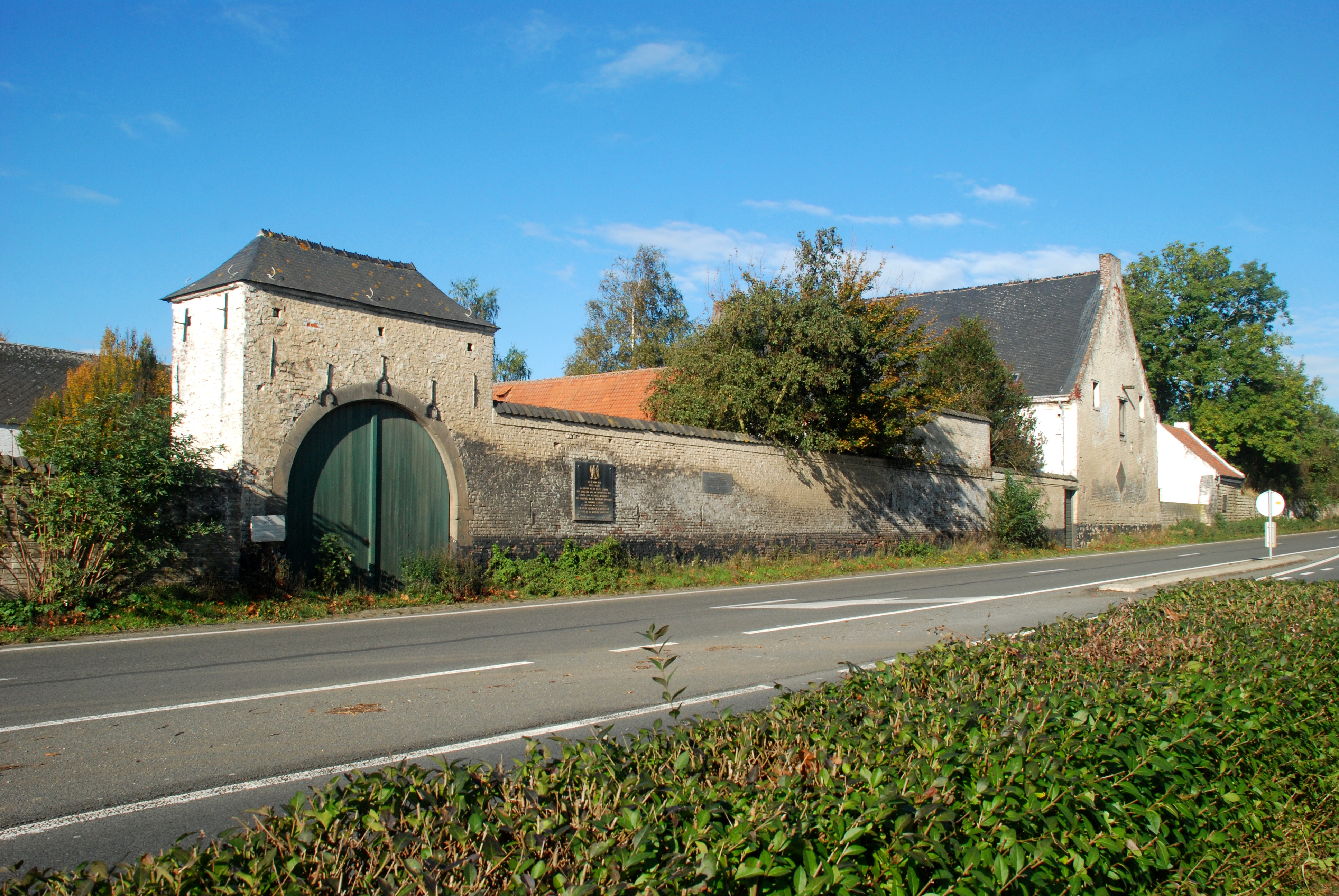 Belgique - Brabant wallon - Lasne - Plancenoit - Ferme de la Haie Sainte (bataille de Waterloo)